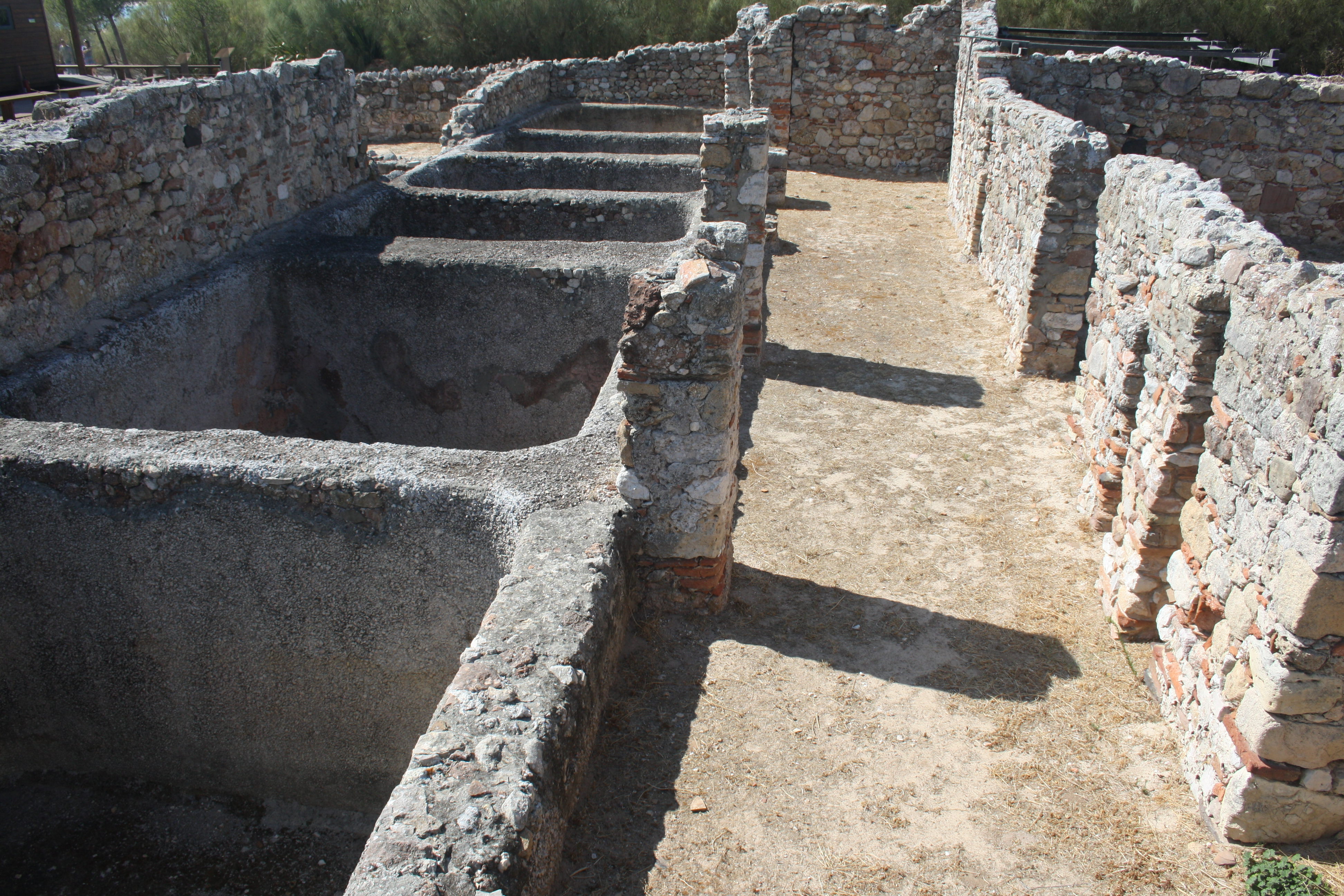 Bassins voor het zouten van vis